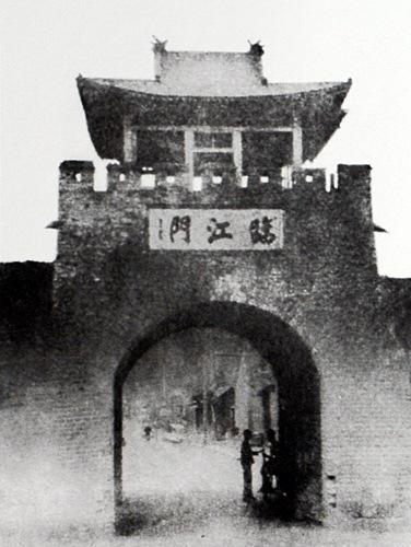 吉林城临江门，1920年摄